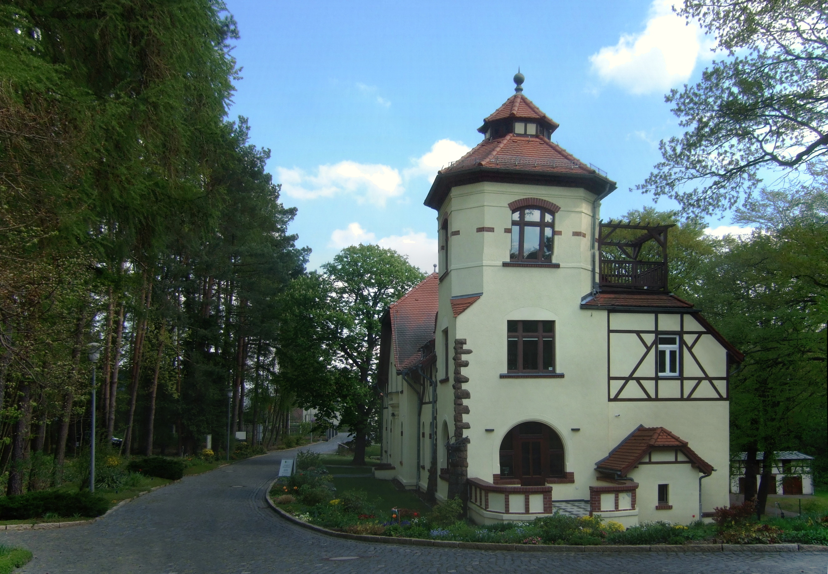 "Haus Energie", das Wohnhaus Wilhelm Ostwalds